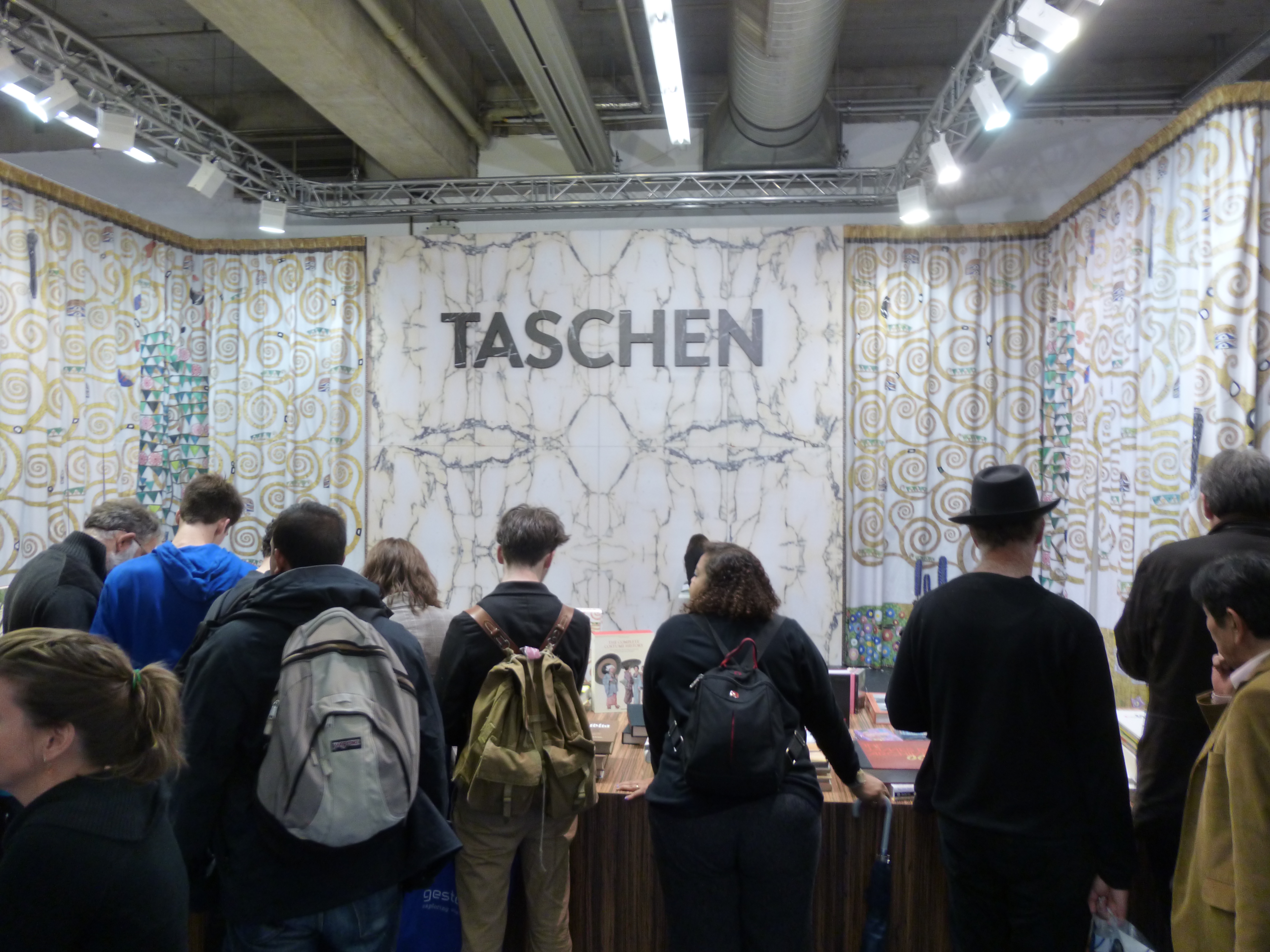 stando de la eldonejo Taschen en la Frankfurta librofoiro 2012